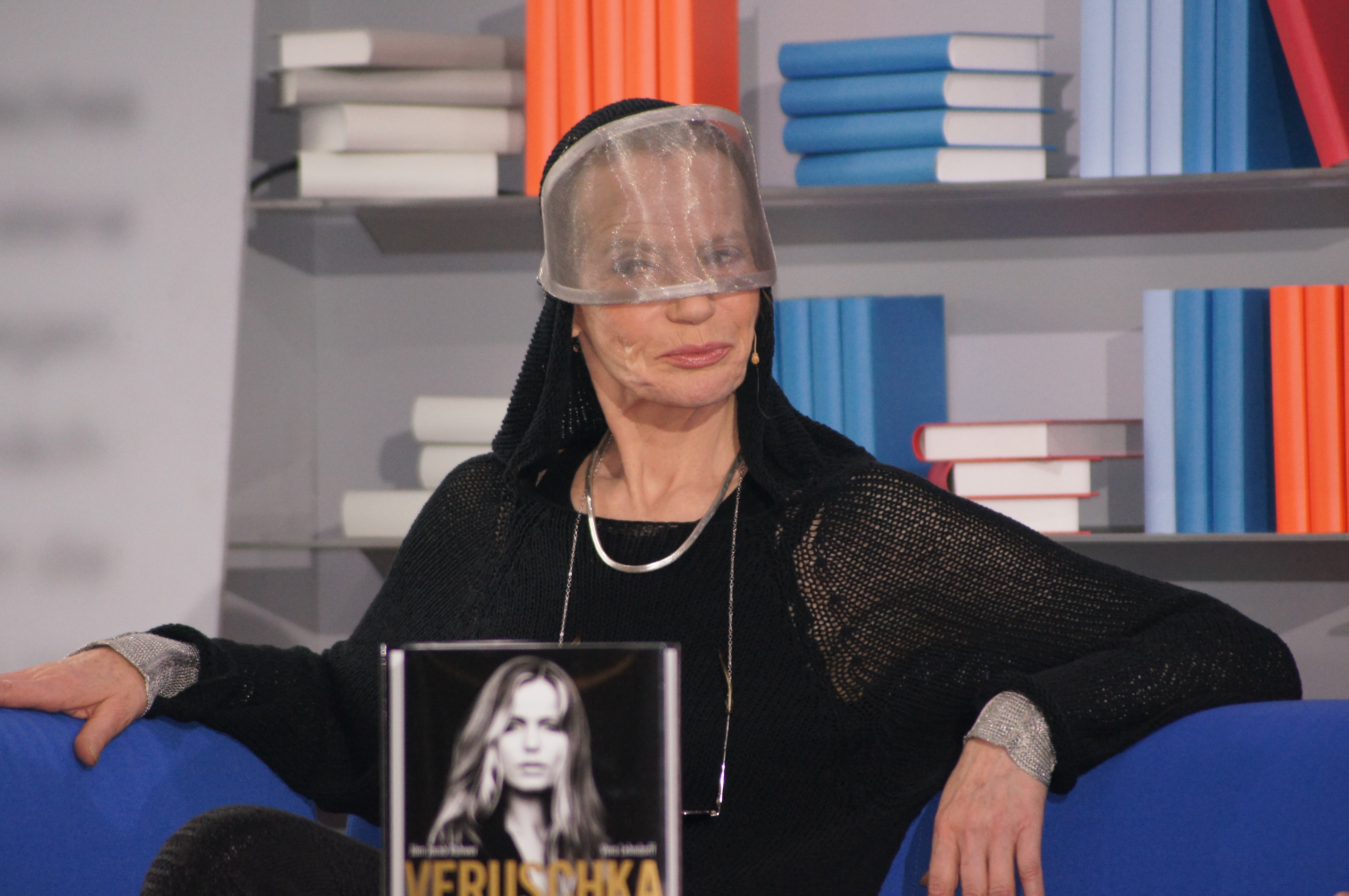 Veruschka Gräfin von Lehndorff. Dieses Fotos dürfen Sie honorarfrei nutzen, wenn Sie folgenden credit beachten: Copyright: Das Blaue Sofa / Club Bertelsmann.